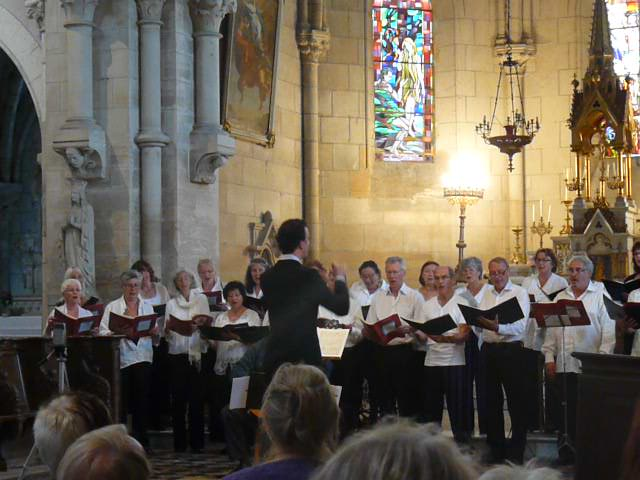 Concert en l'église Notre Dame d'Aubenton, par un Ensemble vocal hollandais en août 2011